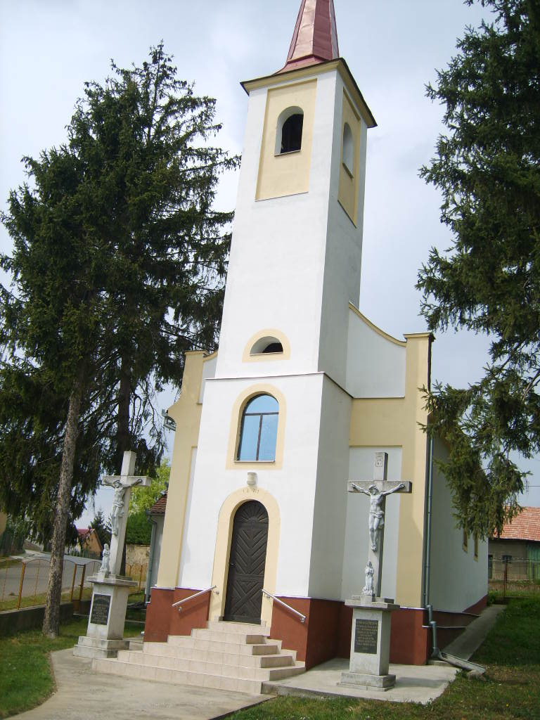 A romonyai Rózsafüzér Királynője kápolna